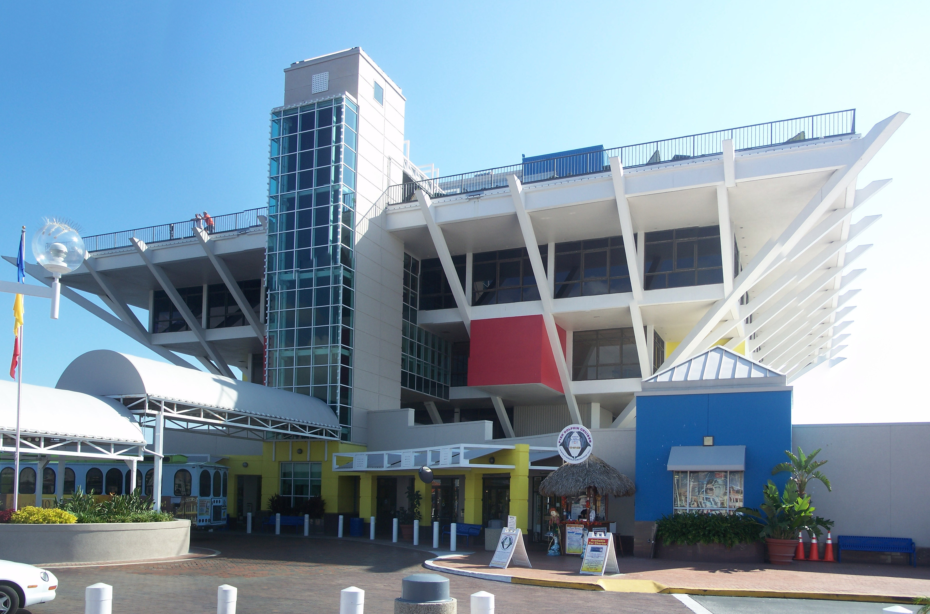 St. Petersburg, Florida: St. Petersburg Pier